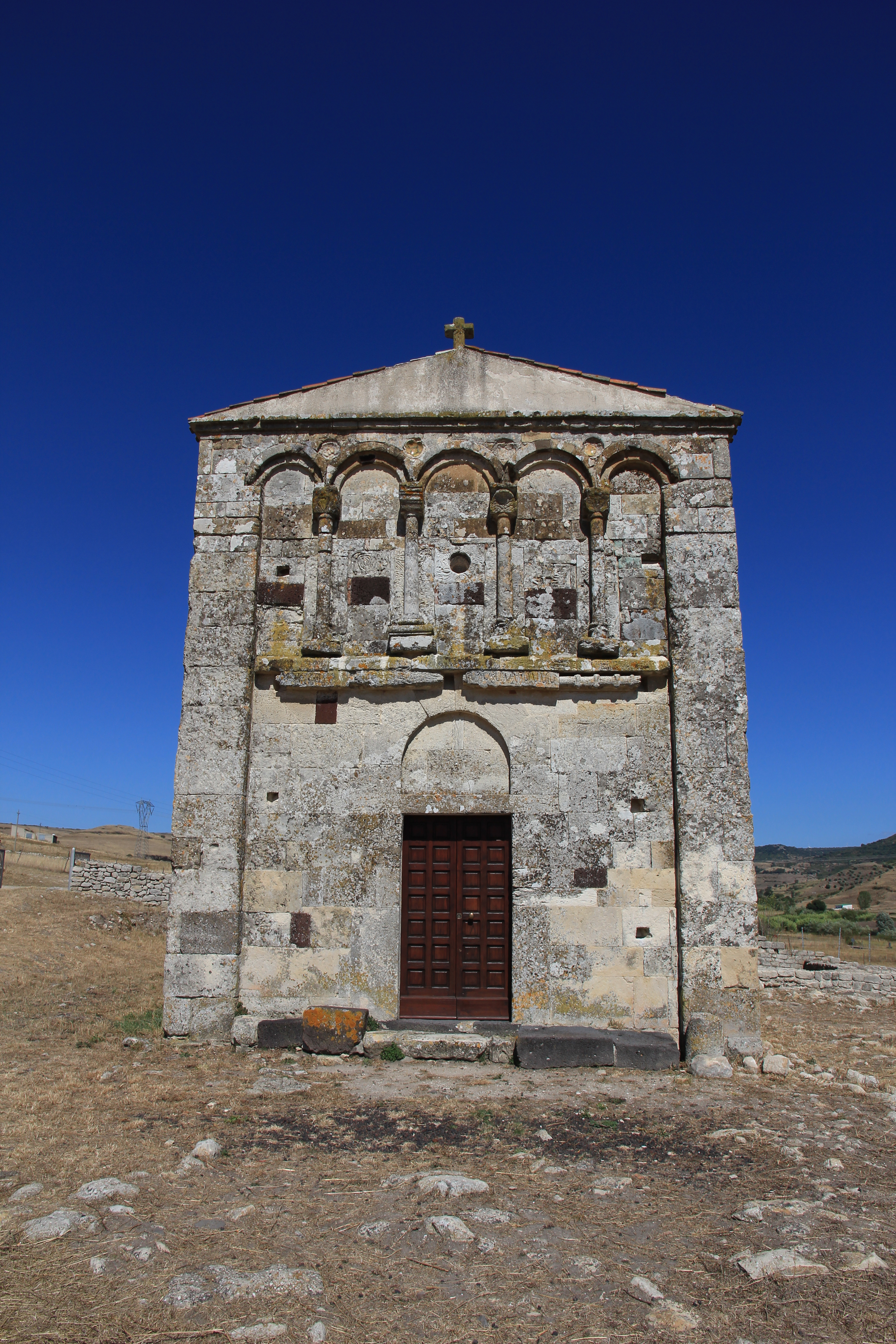 Chiesa di San Nicola di Trullas